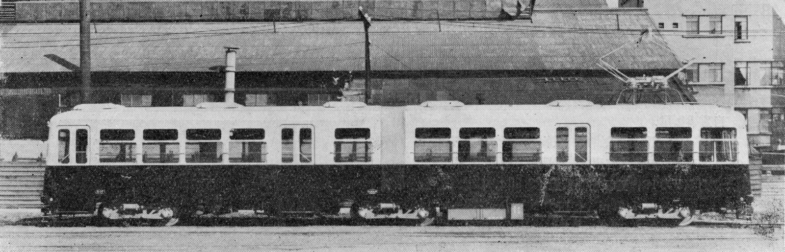 西鉄北九州線1000形電車のサイドビュー。